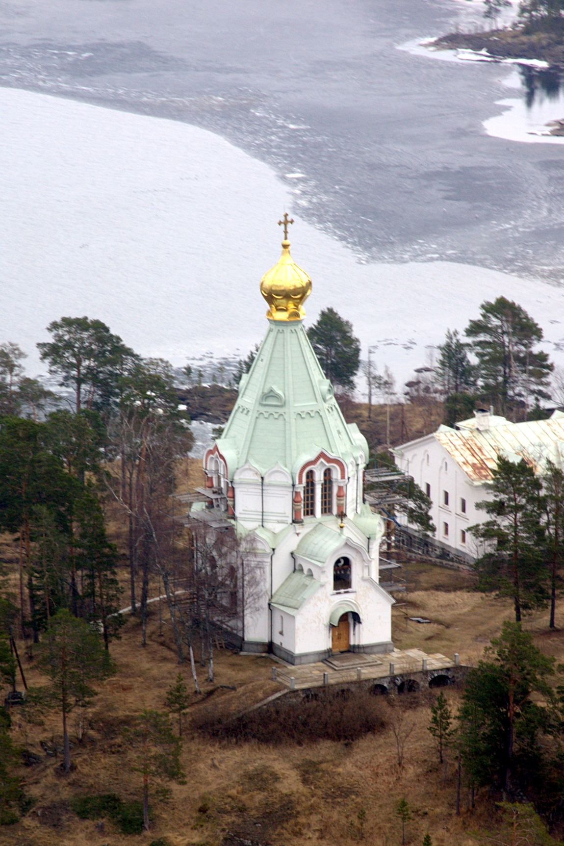 Валаам. Церковь во имя святителя Николая Чудотворца (1853).